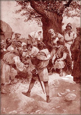 Věnceslav Černý - Žižkův stůl